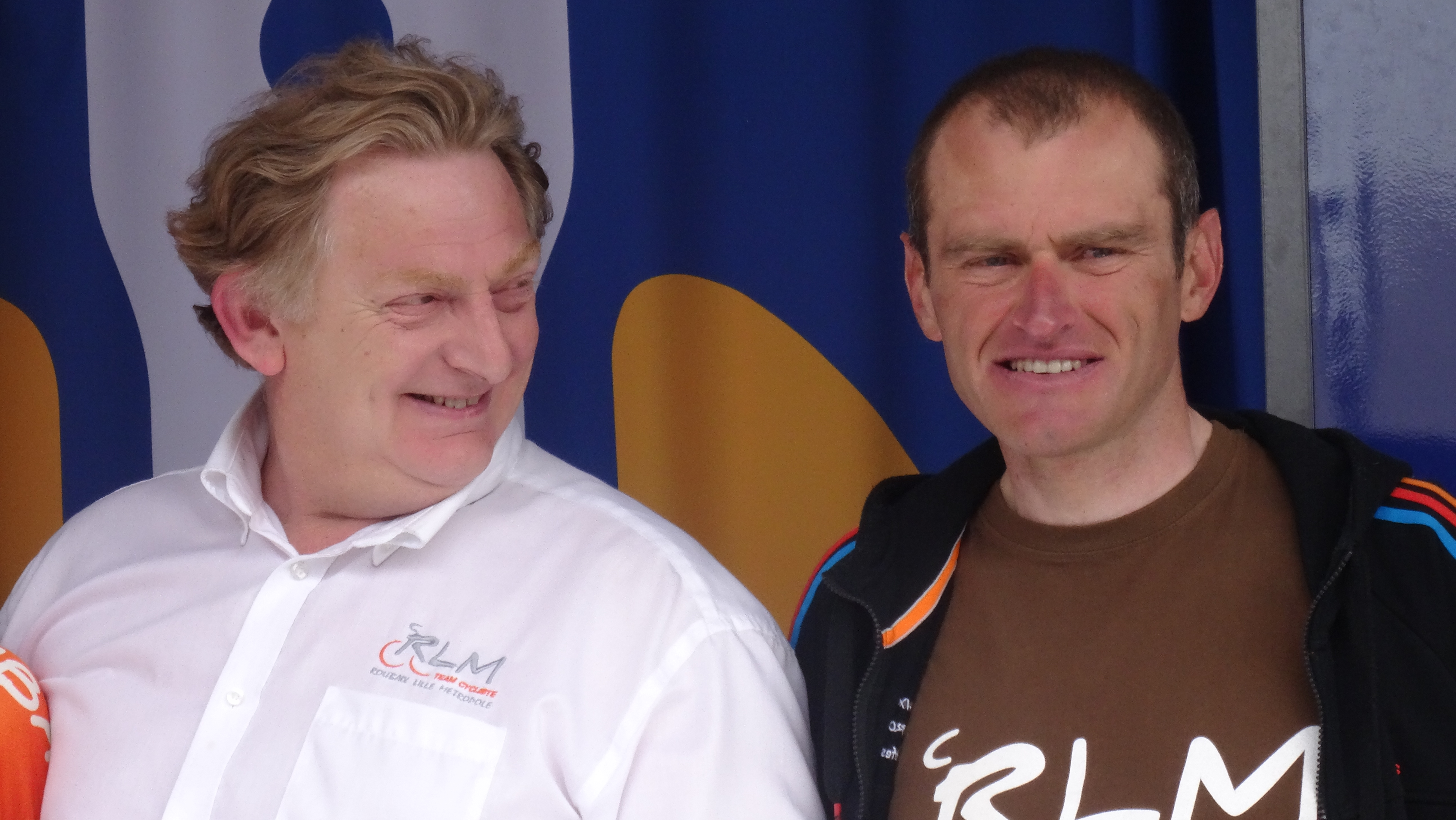 Reportage photographique réalisé le dimanche 25 mai 2014 à l'occasion du départ et de l'arrivée de la troisième étape du Paris-Arras Tour 2014 à Arras, Pas-de-Calais, Nord-Pas-de-Calais, France. Depicted people: Frédéric Delcambre and Franck Vermeulen